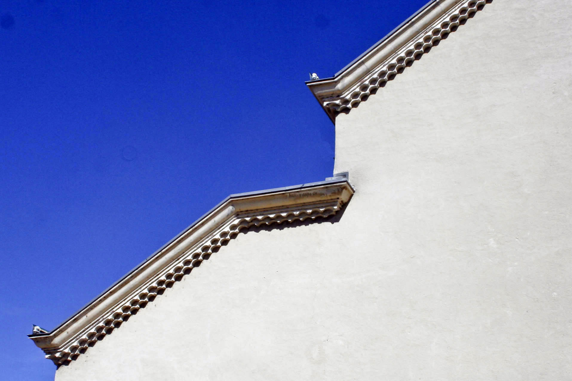 Génoise, église Saint-Pierre de Bourg-lès-Valence, Drôme, France